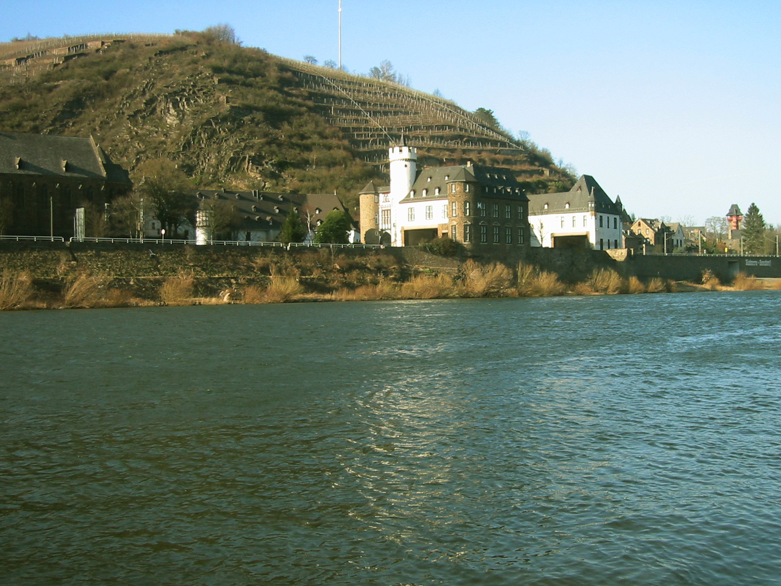 Schloss Leyen in Gondorf an der Untermosel, fotografiert vom gegenüberliegenden Ufer. Erbaut zwischen dem 14. bis 17. Jahrhundert von der Familie "von der Leyen"